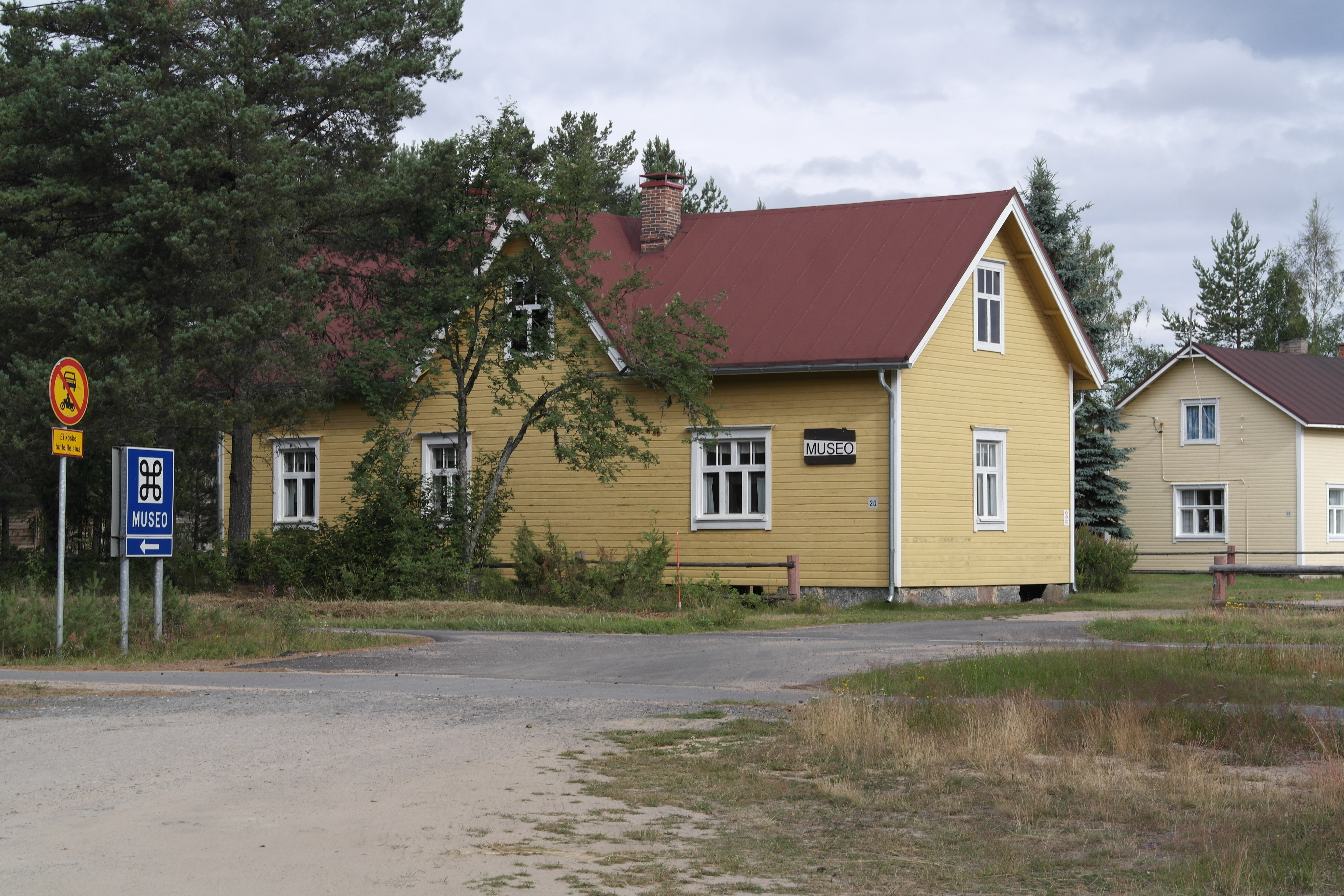 Kniivilän kotiseutumuseon päärakennus Hailuodossa elokuussa 2017